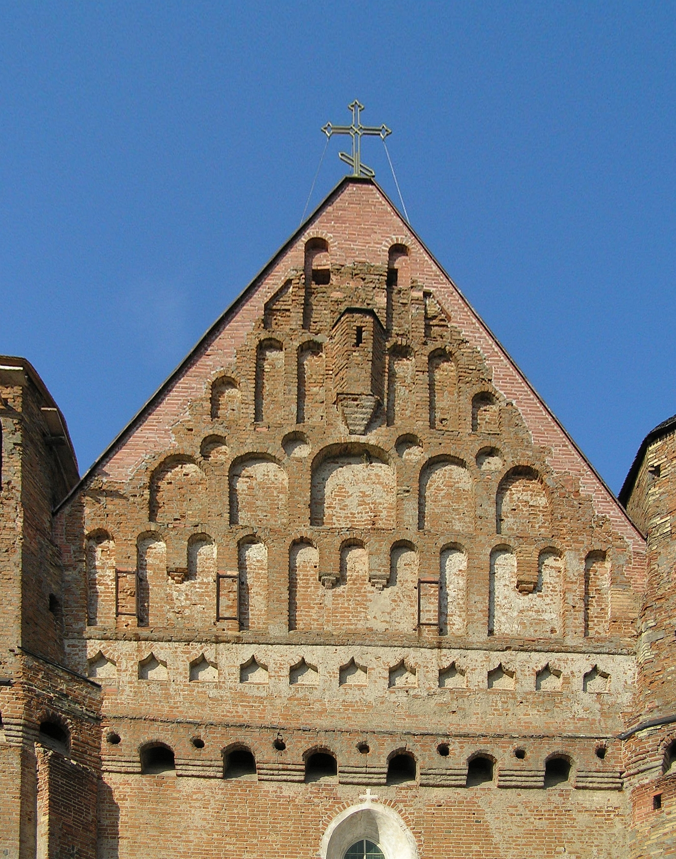 Беларуская (тарашкевіца): Царква абарончага тыпу. в. Сынкавічы This is a photo of Belarusian heritage monument. Reference number: 410Г000282 ( WLM)